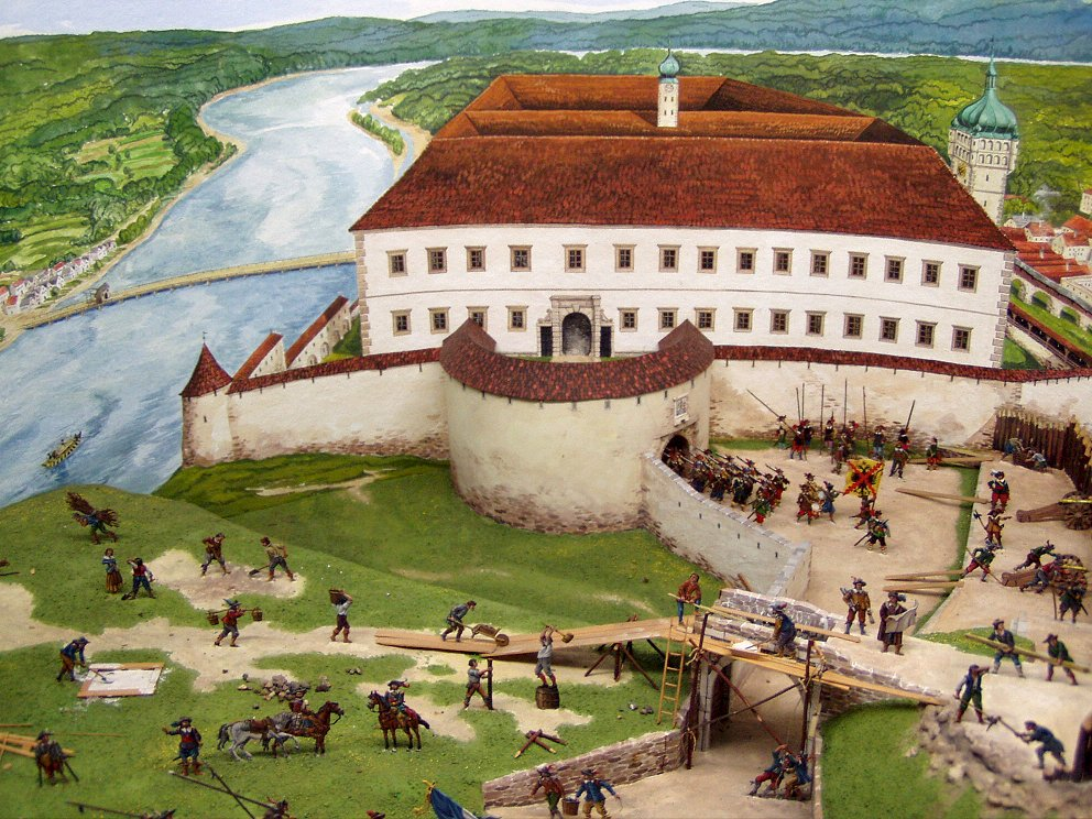 Verstärkung der Fortifikation beim Linzer Schloss